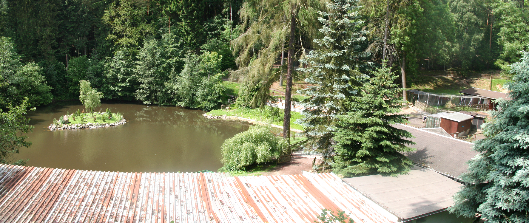 Naturpark "Köbe" mit Teich in Penig (Sachsen)